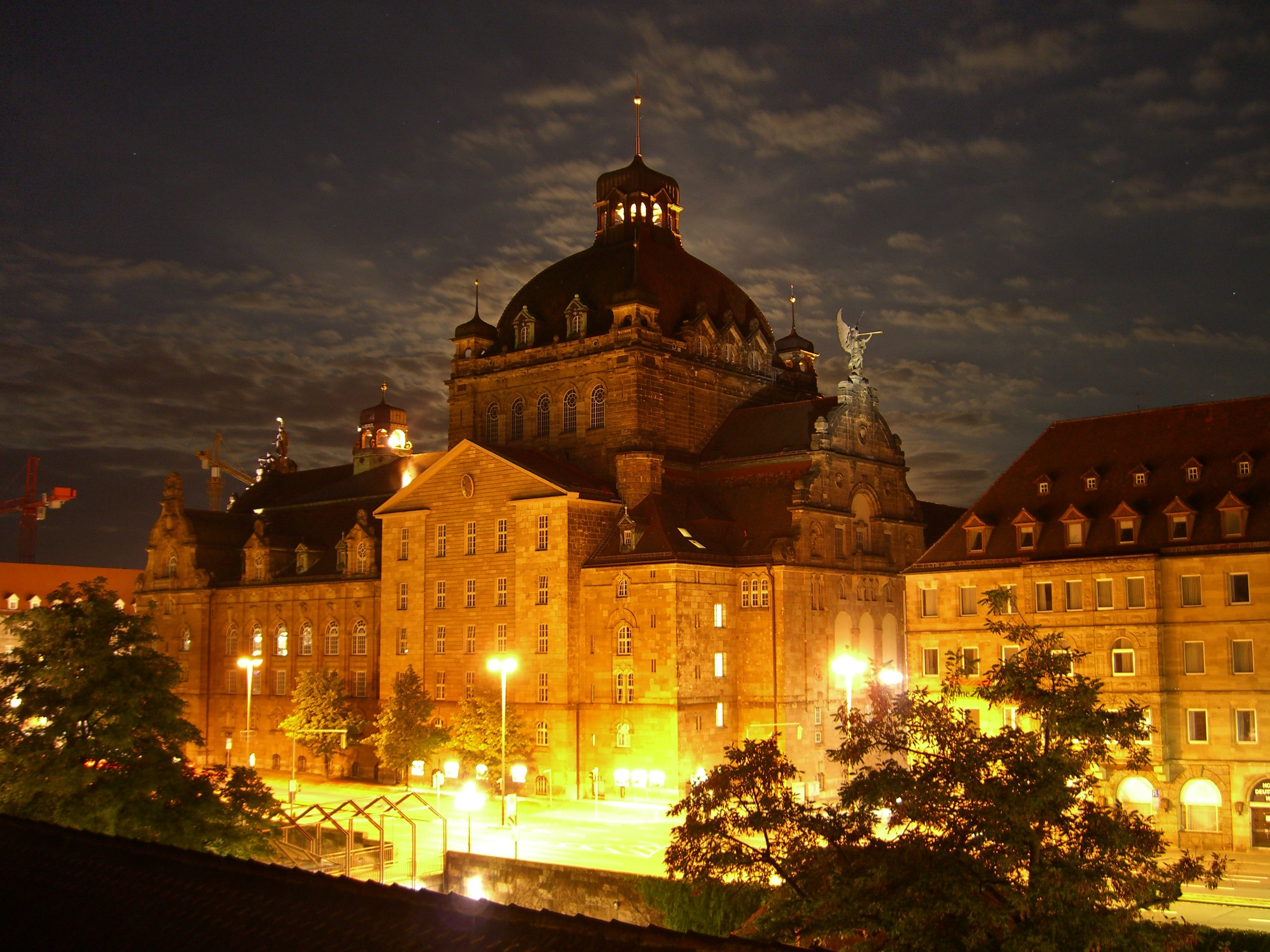 Staatstheater Nürnberg, Montage aus zwei Fotografien mit unterschiedlicher Belichtungszeit